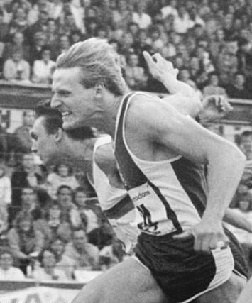 Steffen Bringmann ADN-ZB Kluge 26.6.88 Rostock: 39. DDR-Meisterschaften Leichtathletik - DDR-Meister über 100 Meter der Männer wurde am 25.6.1988 Leipziger Steffen Bringmann.